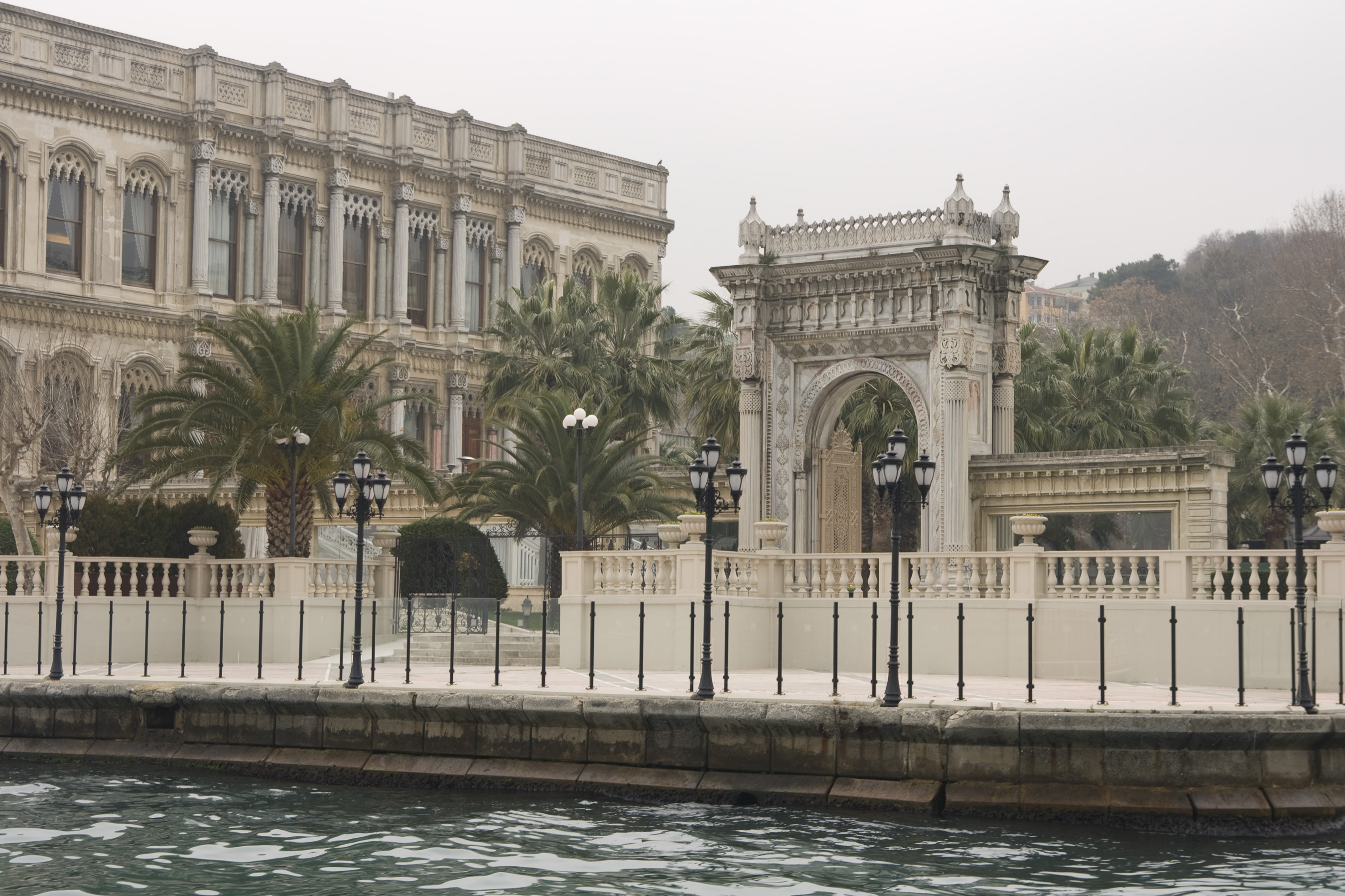 Yıldız Mh., Çırağan Cd. No:32, 34349 Beşiktaş/İstanbul, Turkey